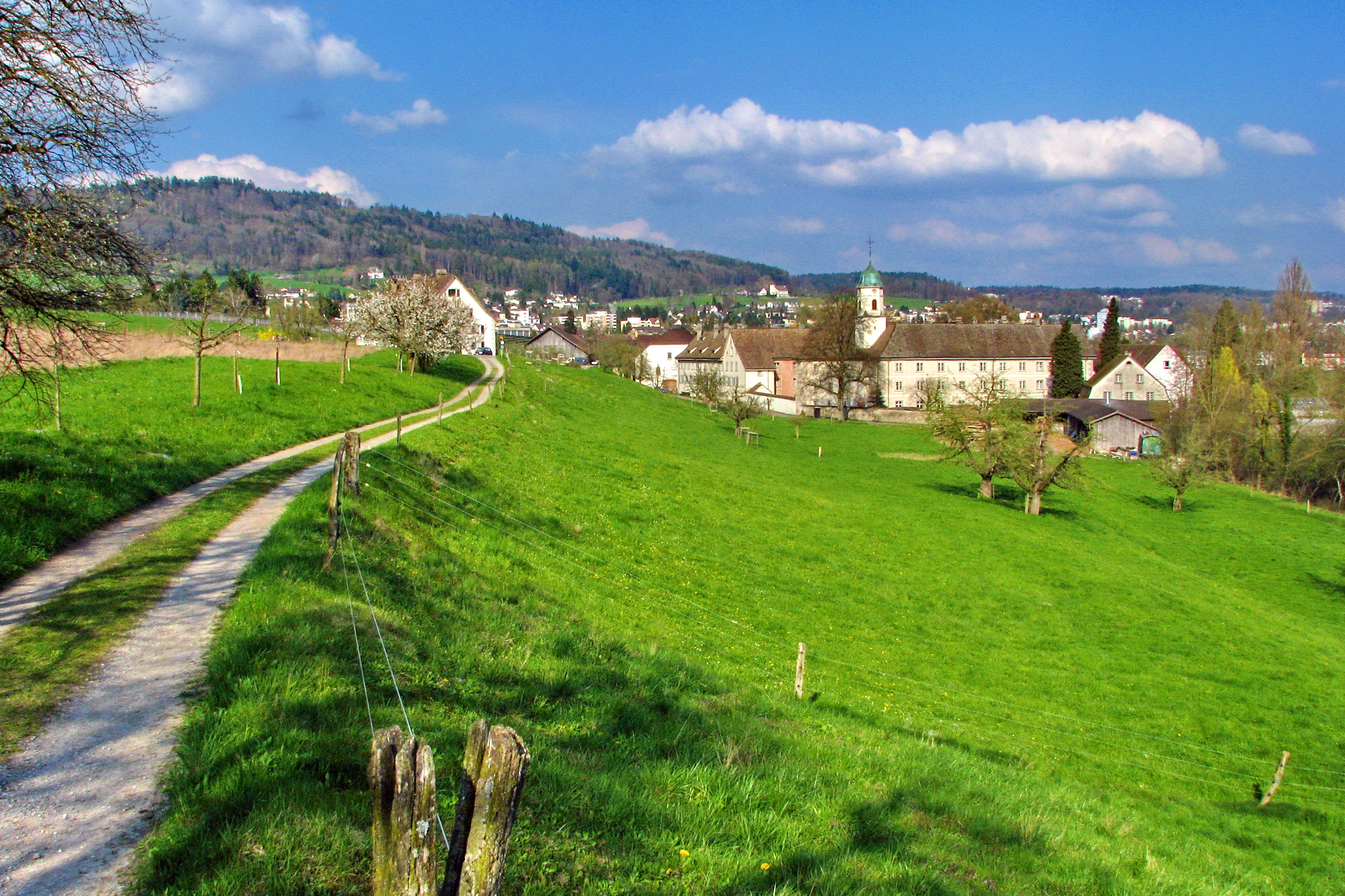 Kloster Fahr in Würenlos, Unterengstringen to the left, Limmattal in the background.